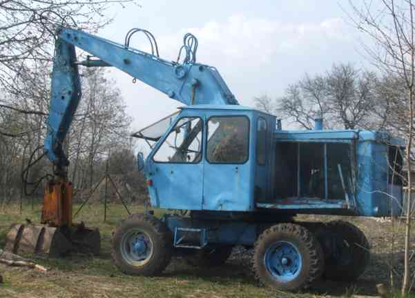 Mobilbagger aus Weimar - hier der T174 Baujahr 1981